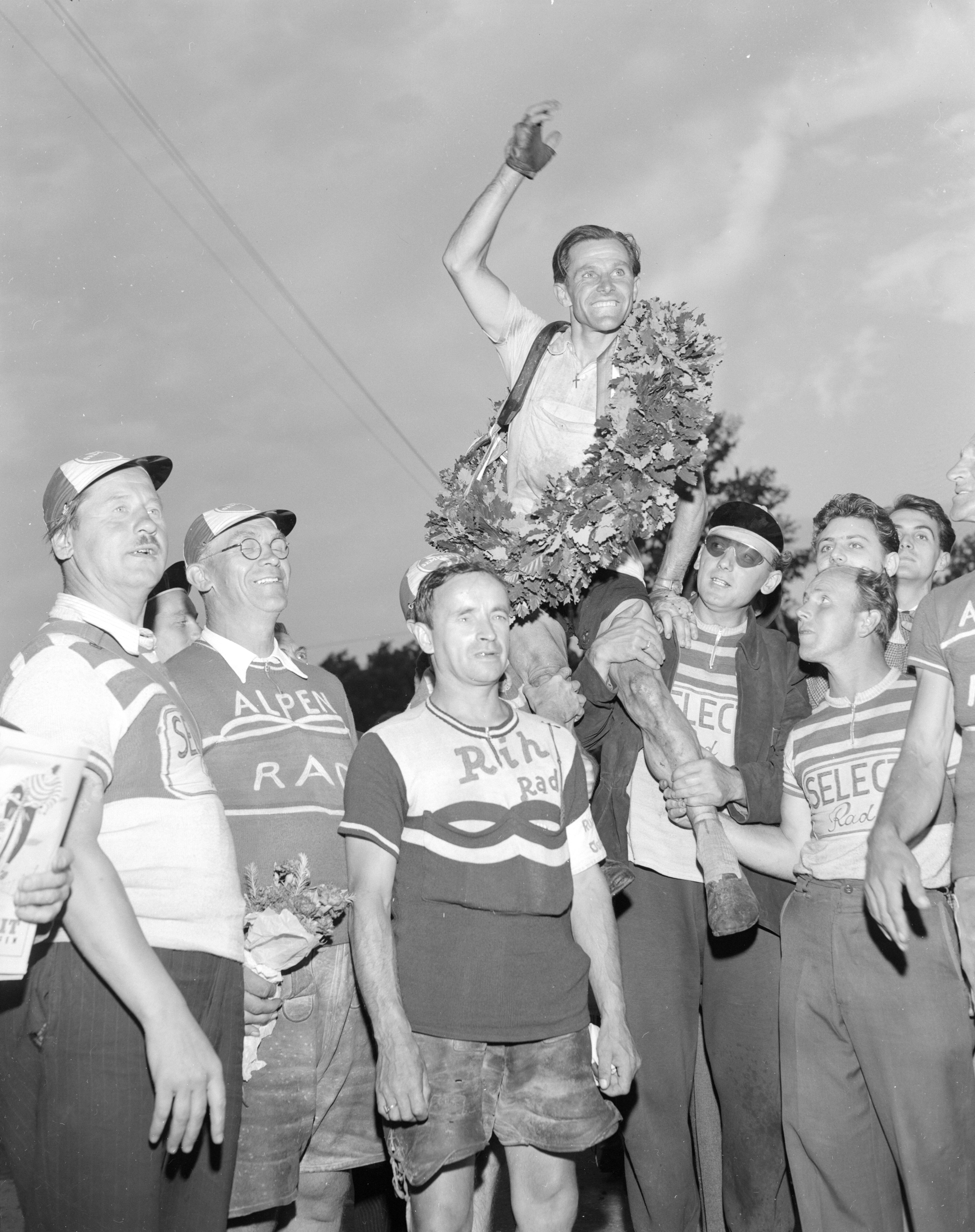 Richard Menapace mit dem Siegerkranz der Österreich-Rundfahrt 1950.